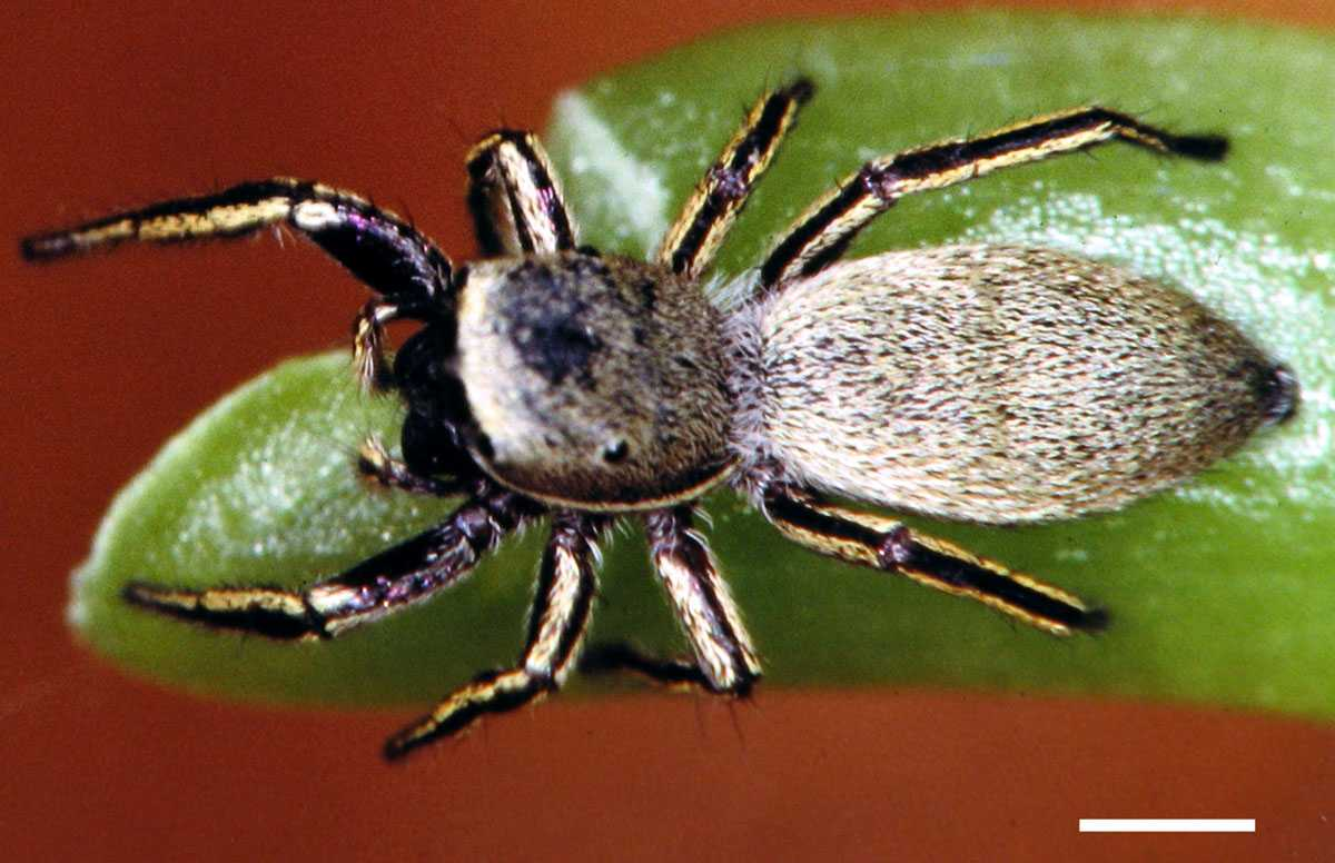 Female Tutelina similis jumping spider from Minnesota